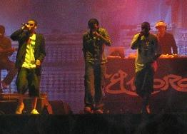 Outlandish.